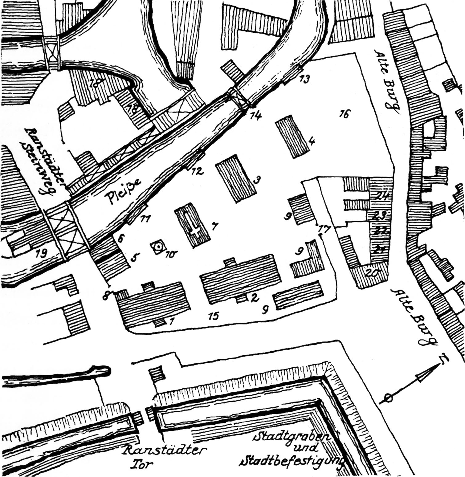 Lageplan des Hospitals zu St. Georg in Leipzig, 1547–1631 Rekonstruktion nach den Angaben in den Hospitalrechnungen